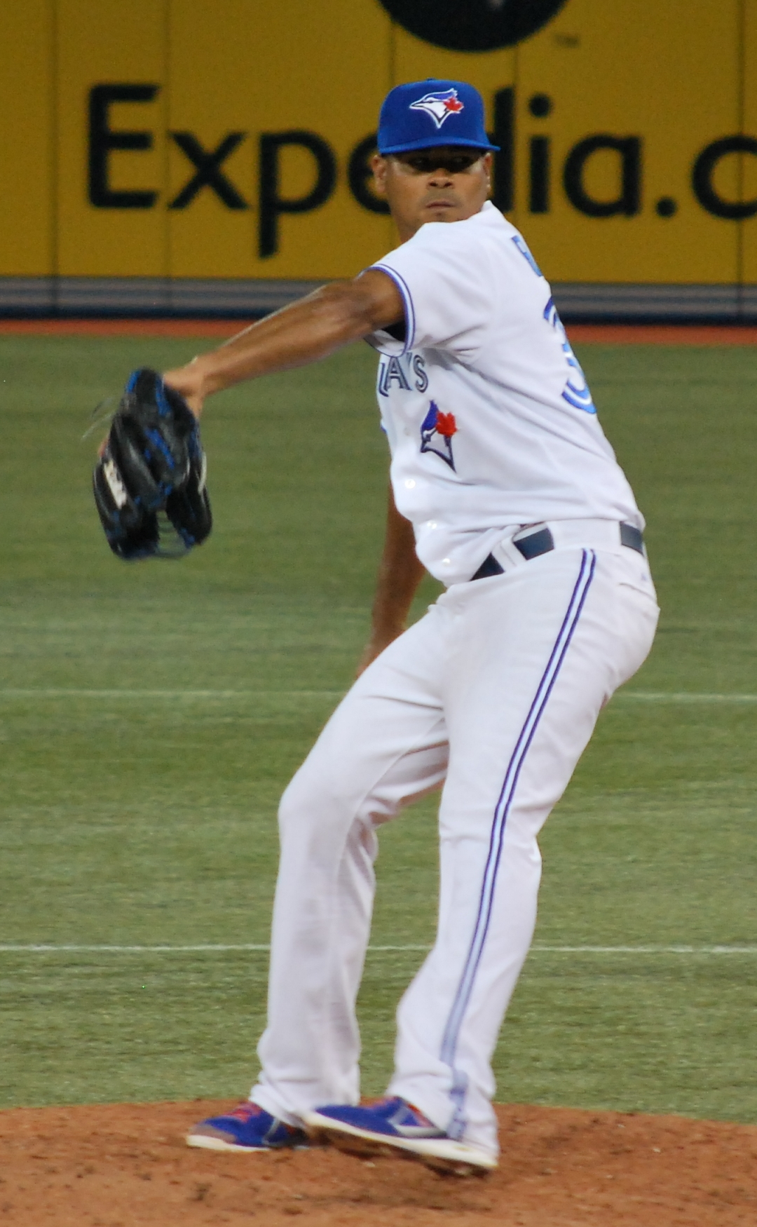 Esmil Rogers